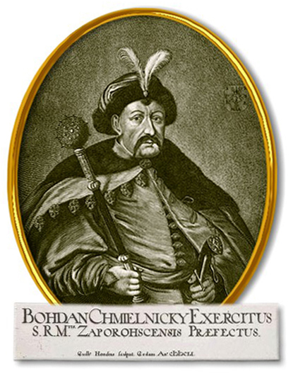 Bohdan Khmelnytsky